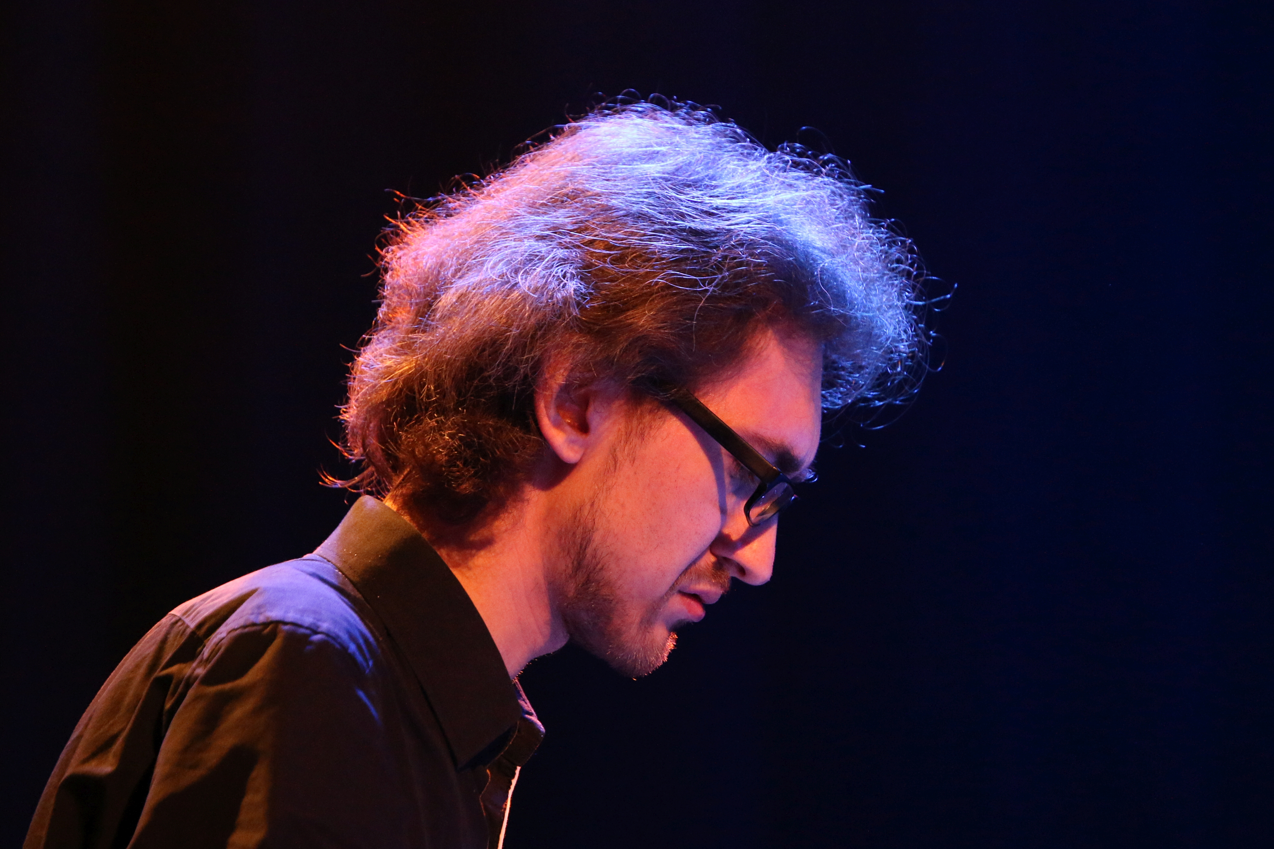 46. Deutsches Jazzfestival Frankfurt 2015: contrast trio +1: Yuriy Sych